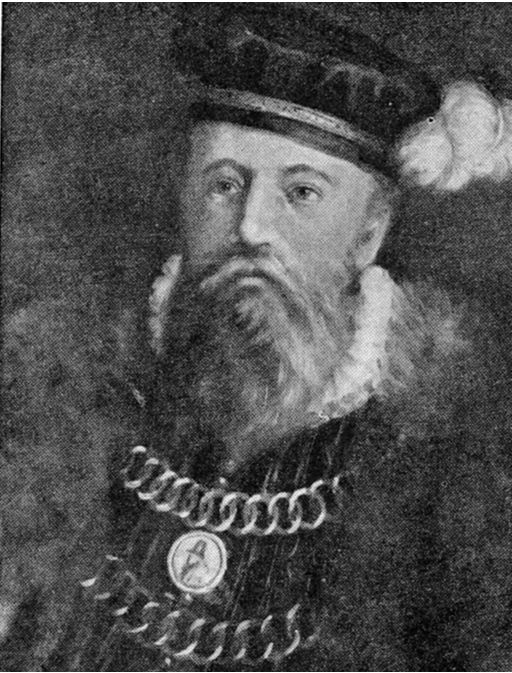 Swedish Admiral Jakob Bagge